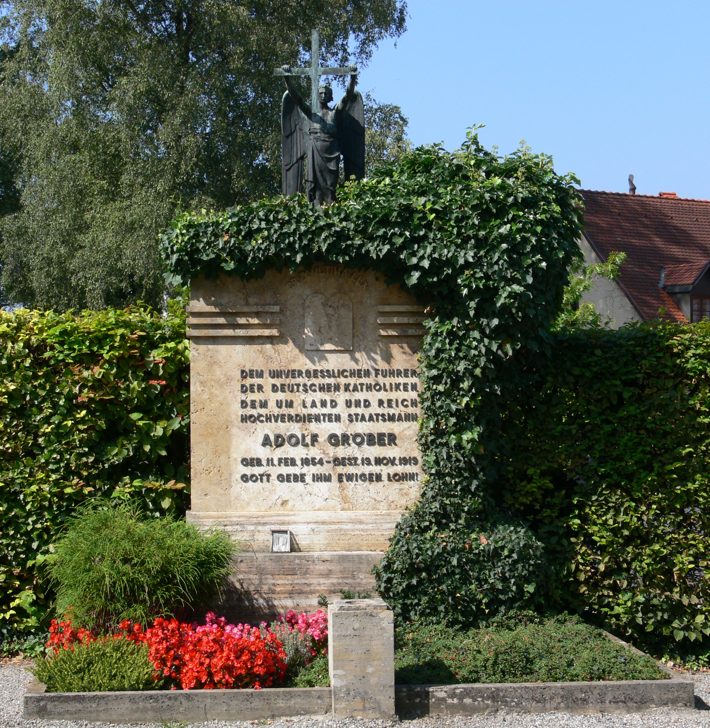 Weingarten (Württemberg), Landkreis RavensburgKreuzbergfriedhof Grabmal Adolf Gröber; Bildhauer: Franz Xaver Eberhard